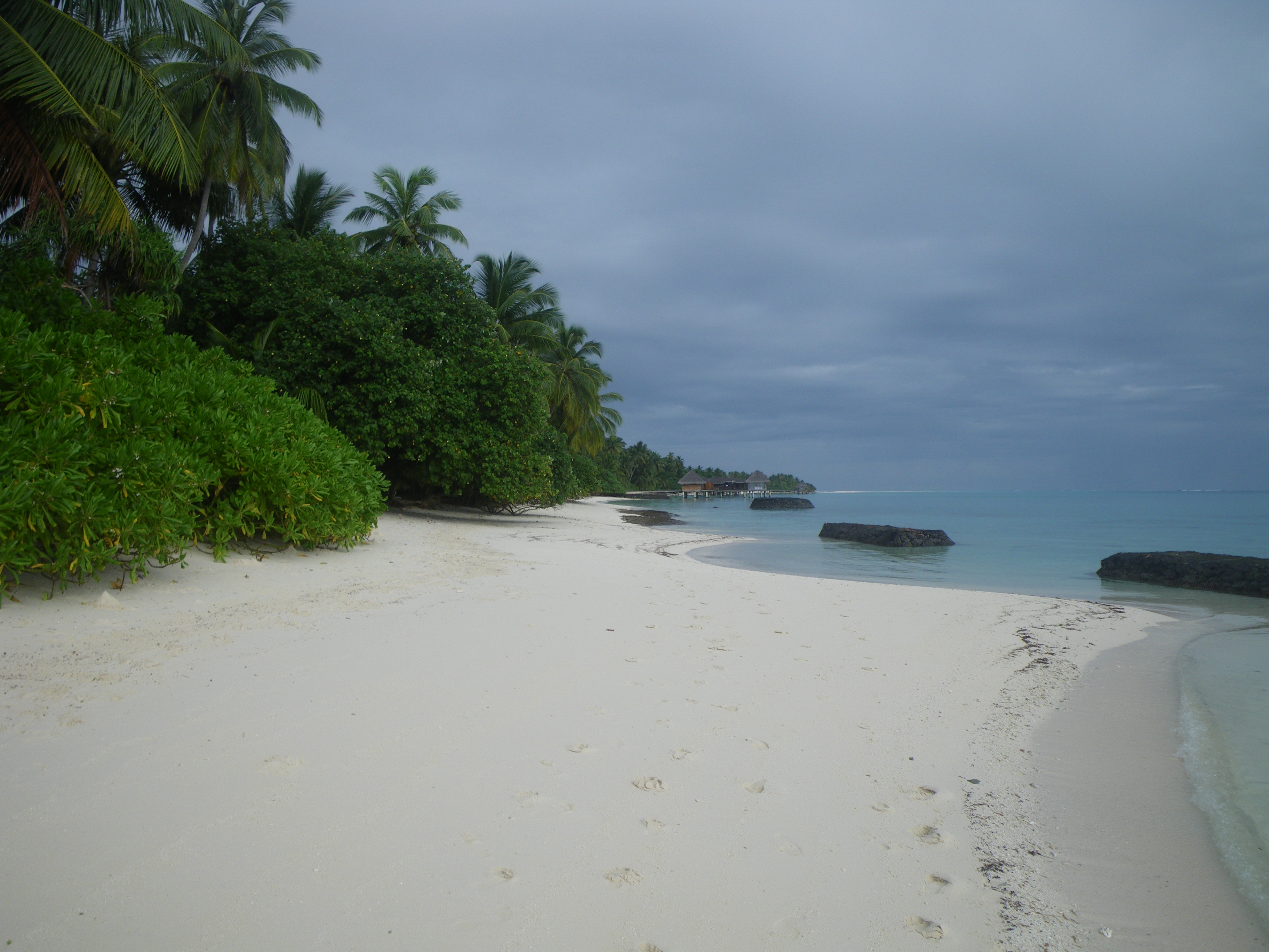 Kuramathi Strand (Lagunenseite)